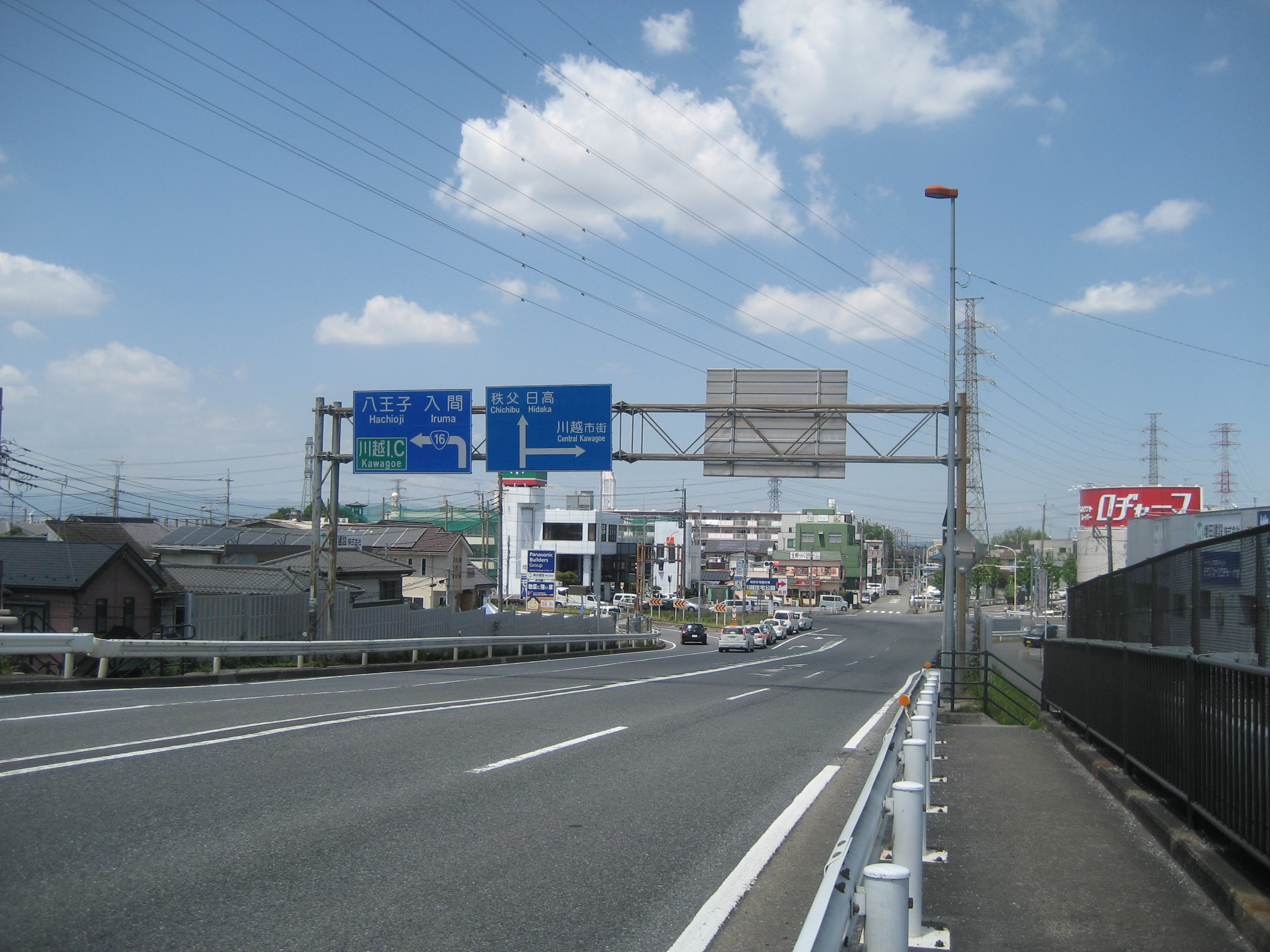 国道16号線川越バイパス埼玉県川越市脇田新町交差点付近